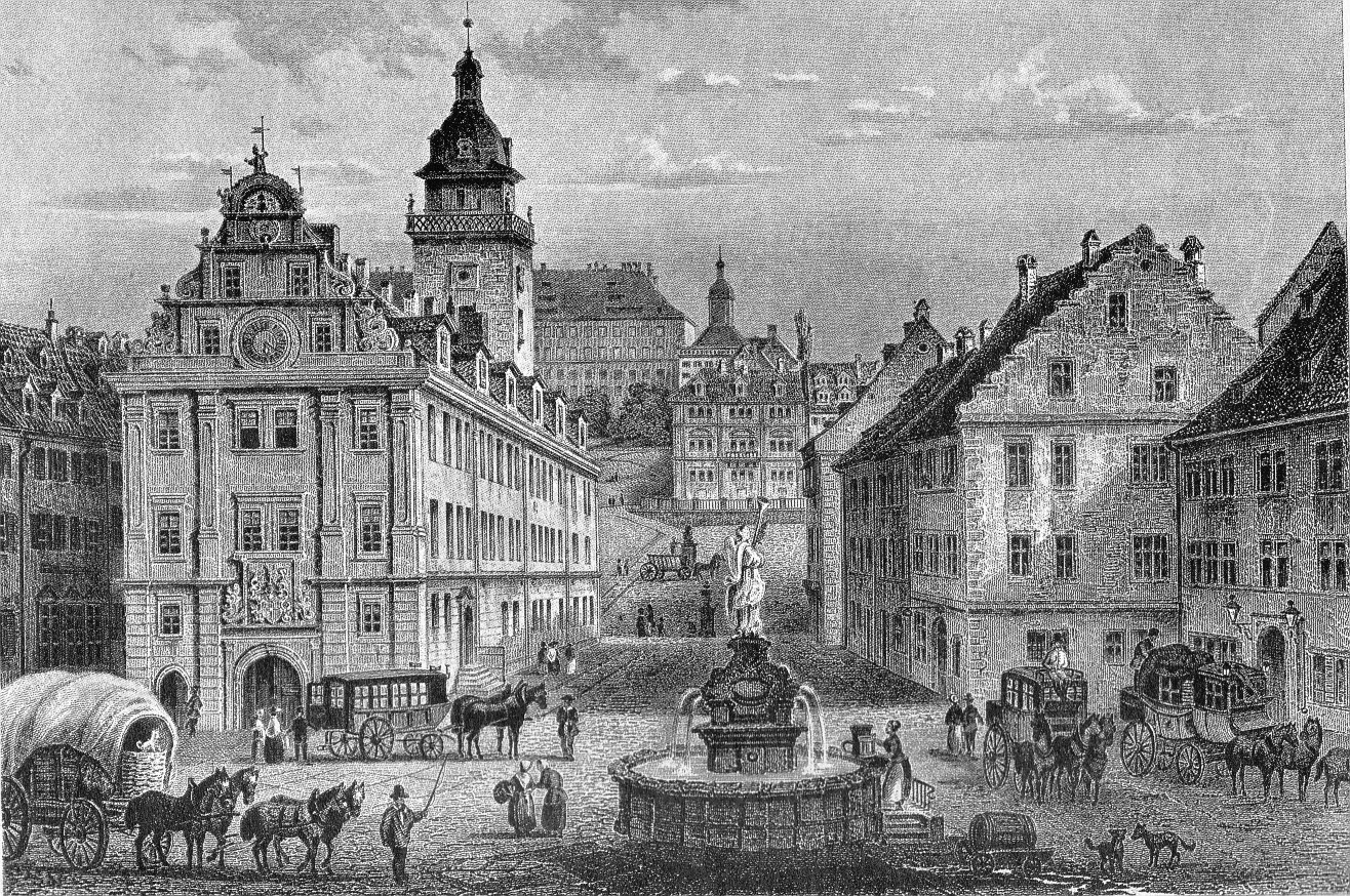 Historische Ansicht von Gotha in Thüringen. Stahlstich.